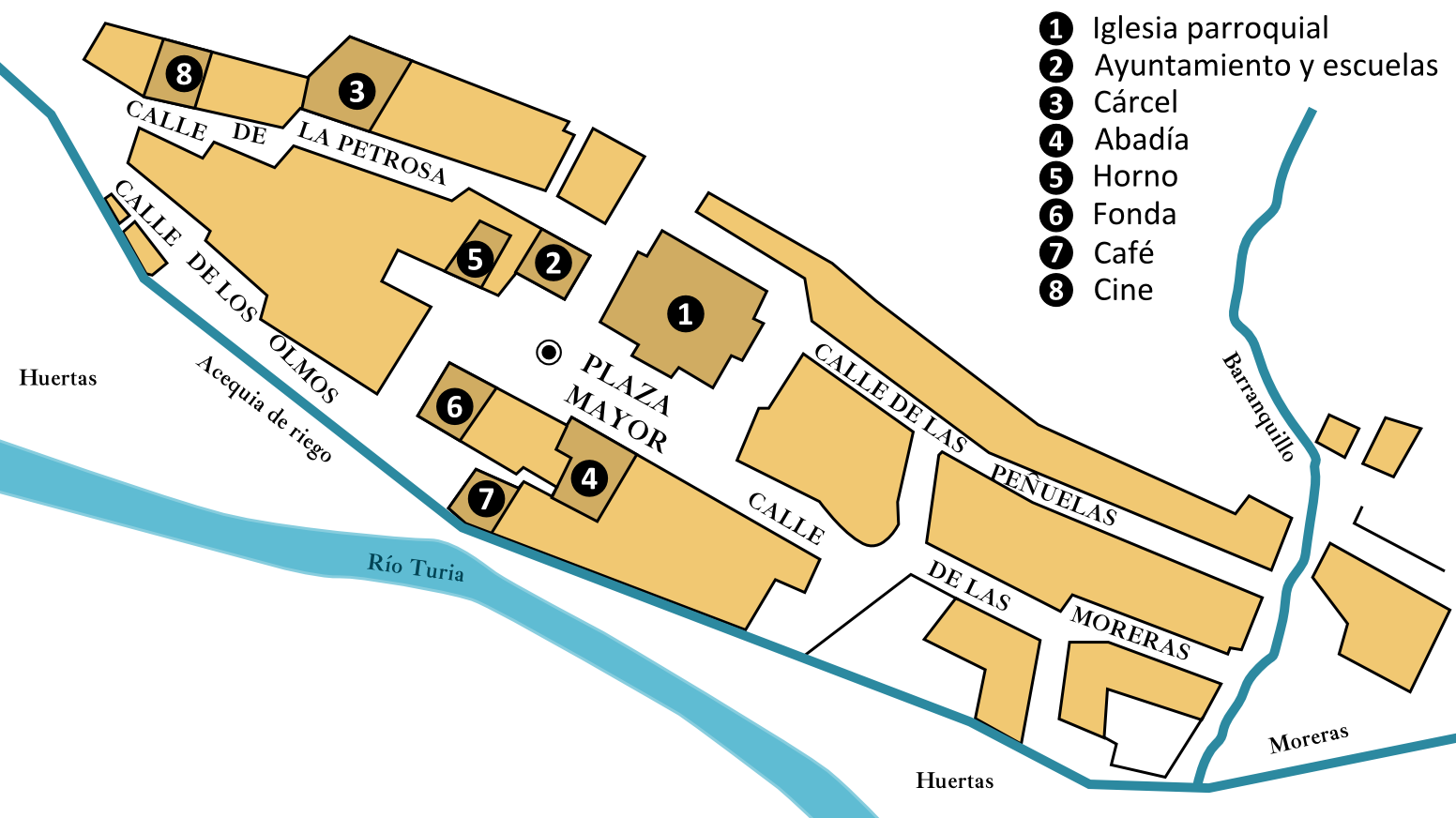 Planol de Benaixeve al 1940, abans de ser inundat per les aigües de l'embassament de Benaixeve.